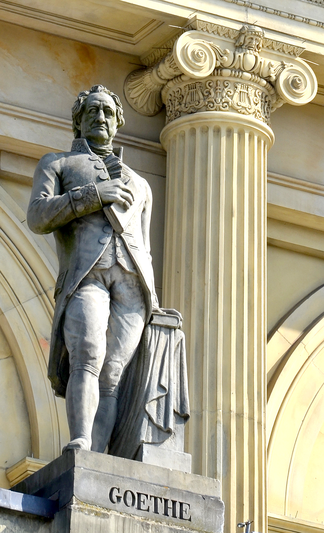 Standbild des Gelehrten Johann Wolfgang von Goethe, das der hannoversche Hofbildhauer Bernhard Wessel für das bis 1852 durch Laves errichtete Opernhaus geschaffen hatte ...